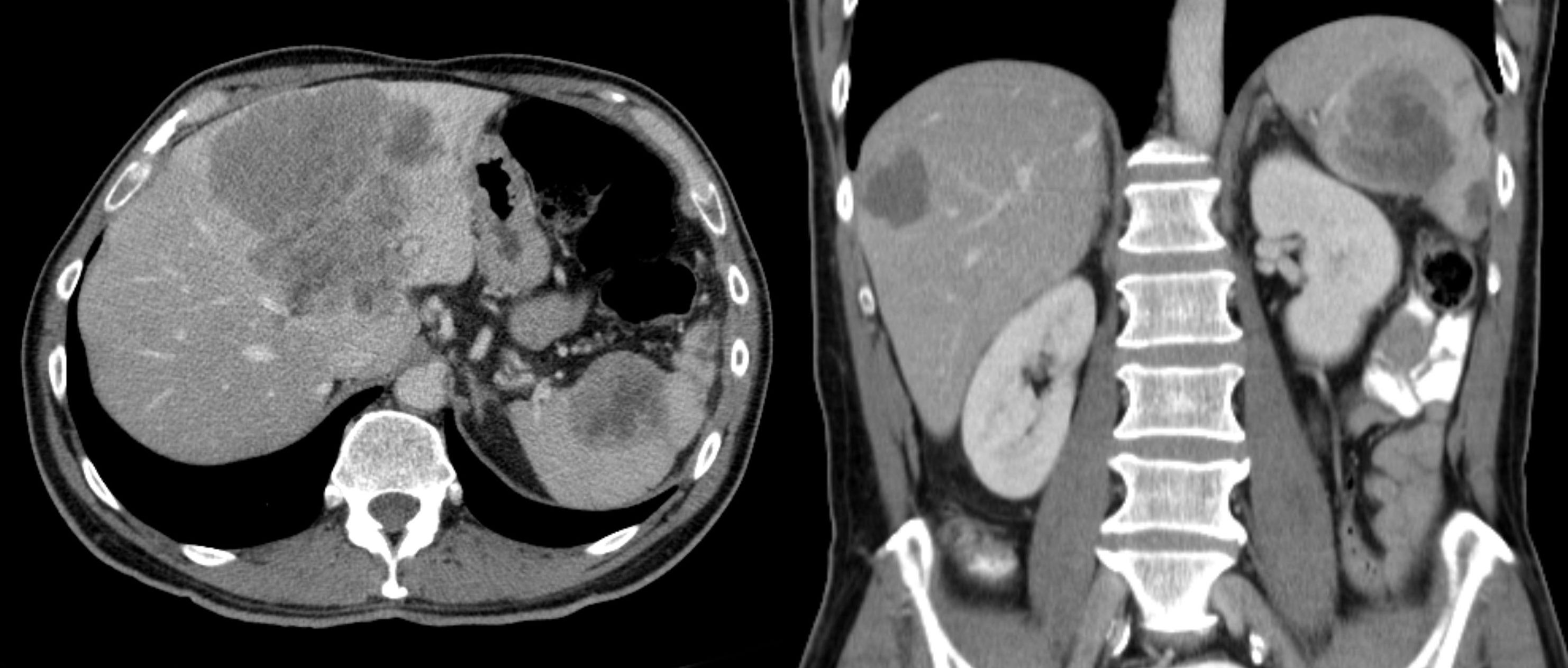 Milz- und Lebermetastasen bei einem niedrig differenzierten Adenokarzinom des Sigmas. Computertomorgaphie axial und coronar.